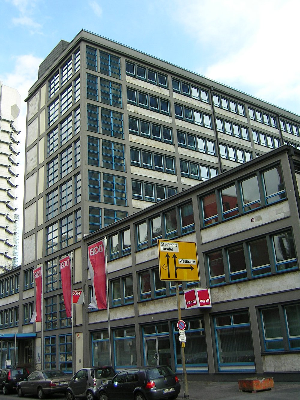 Das Frankfurter Gewerkschaftshaus wurde 1931 nach Plänen der Architekten Franz Hoffmann und Max Taut errichtet und steht unter Denkmalschutz.